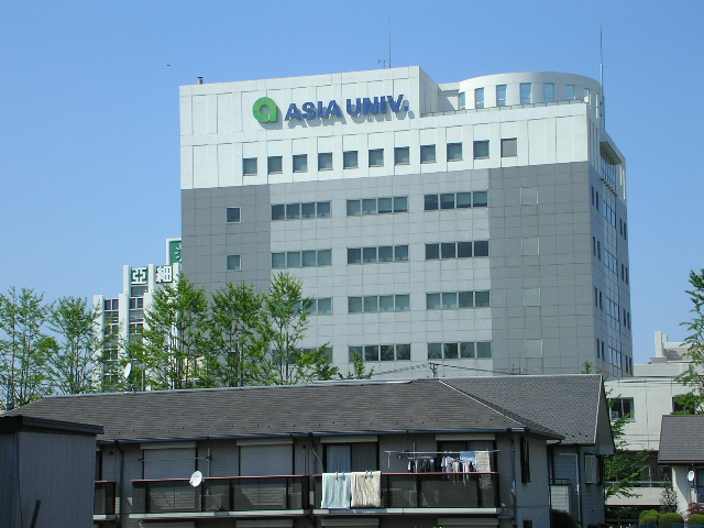 自分で撮影。2006年5月3日、東京都武蔵野市で撮影。 亜細亜大学の建物(手前の高い建物は太田耕造記念館)